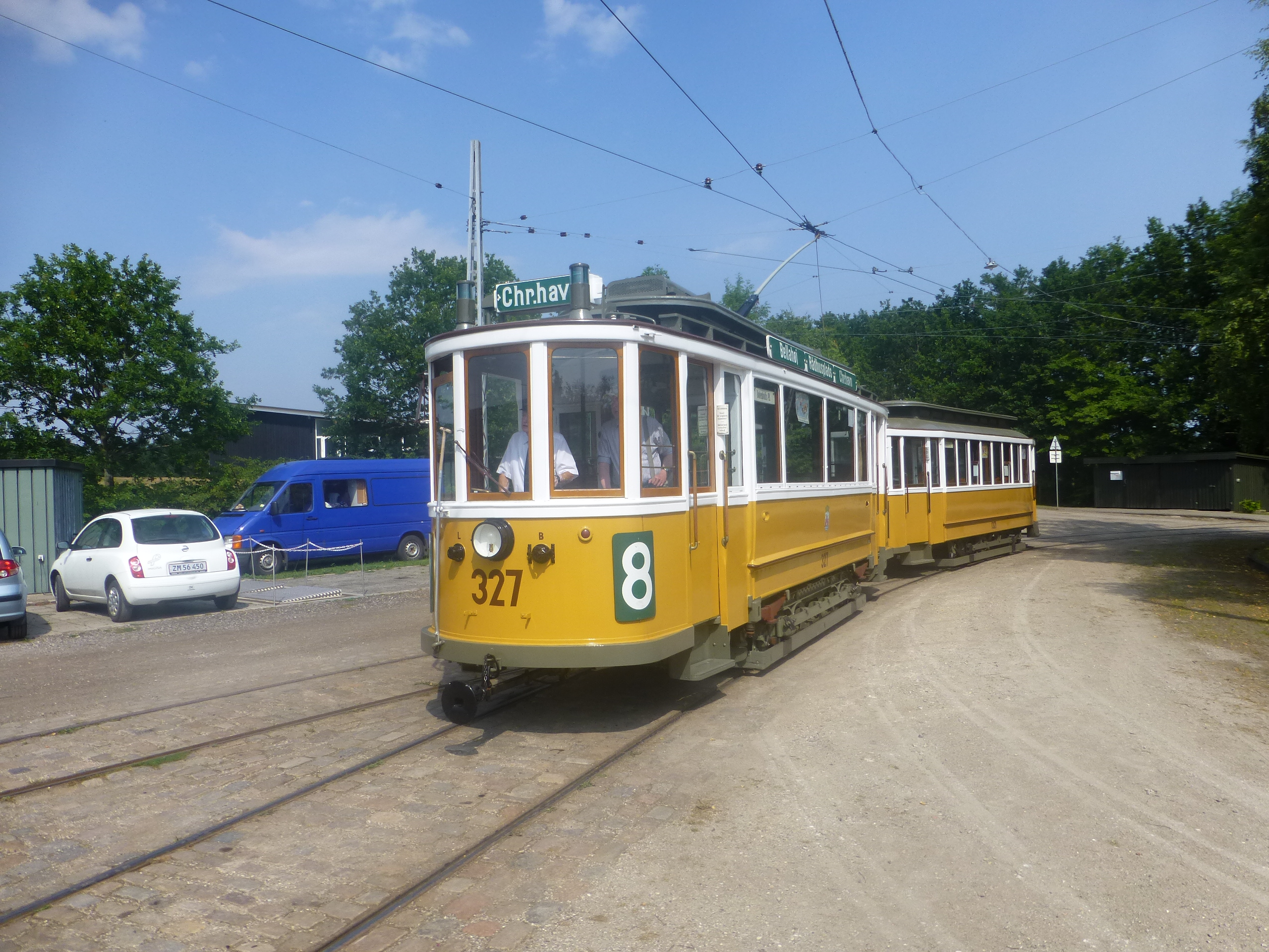 Old trams from Copenhagen KS 327+1321 on Sporvejsmuseet Skjoldenæsholm in Denmark.